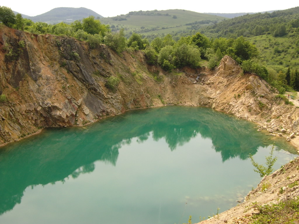 Travertín v obci Beňatina v okrese Sobrance